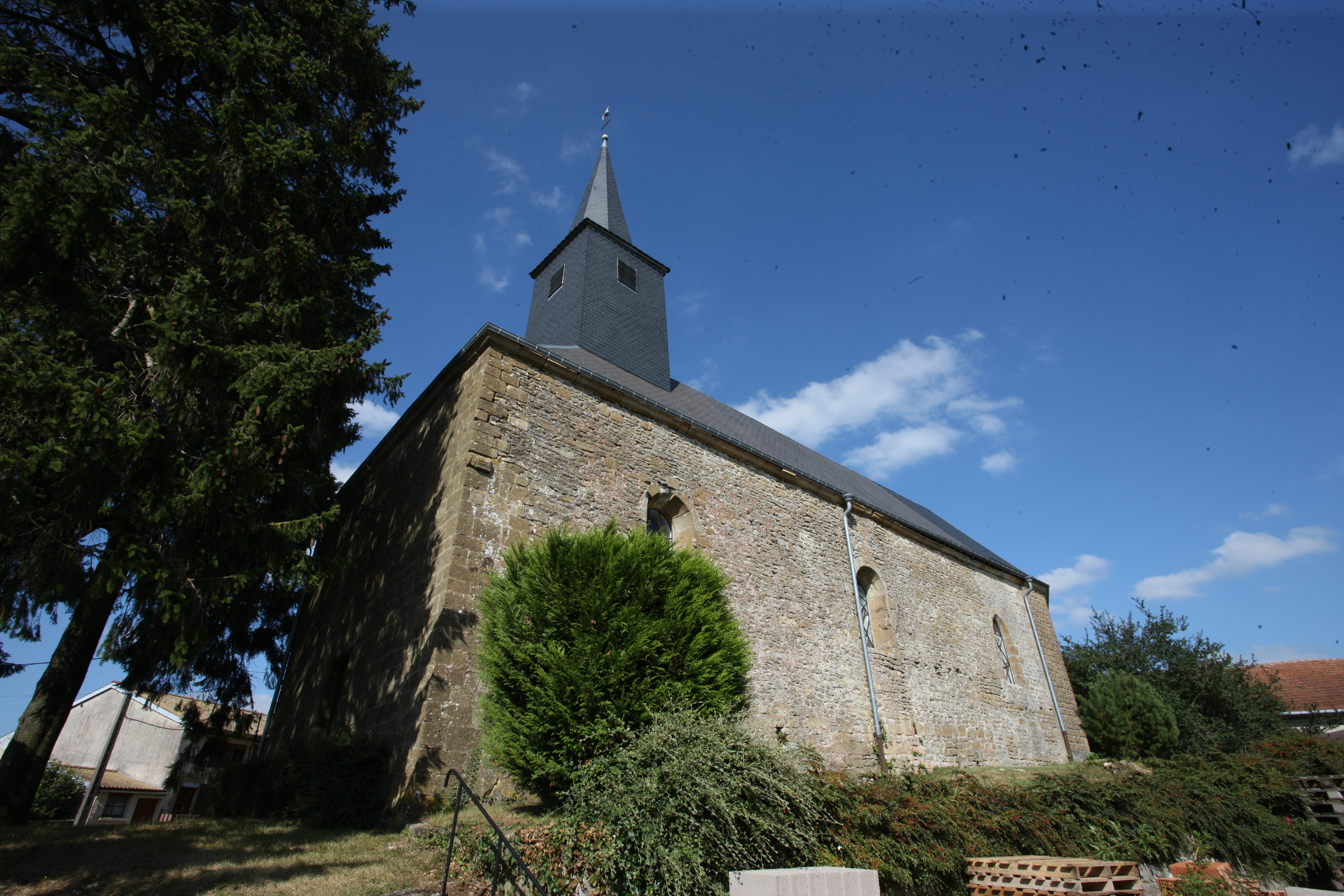 Église Saint-Nicolas , (Inscrit le 28 novembre 2011) .